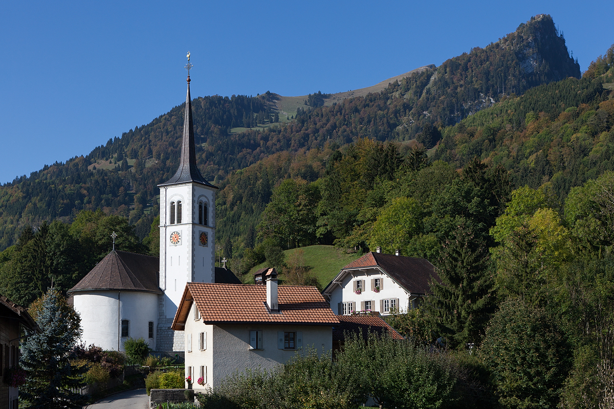 Kirche von Neirivue